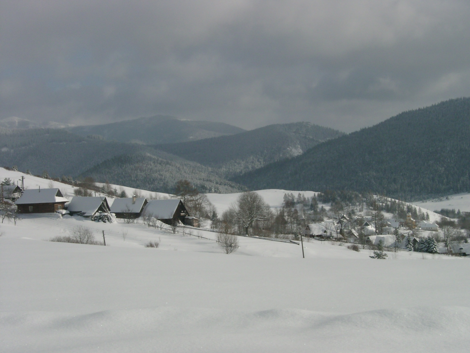 Veľké Borové, zima, pohľad z chotára